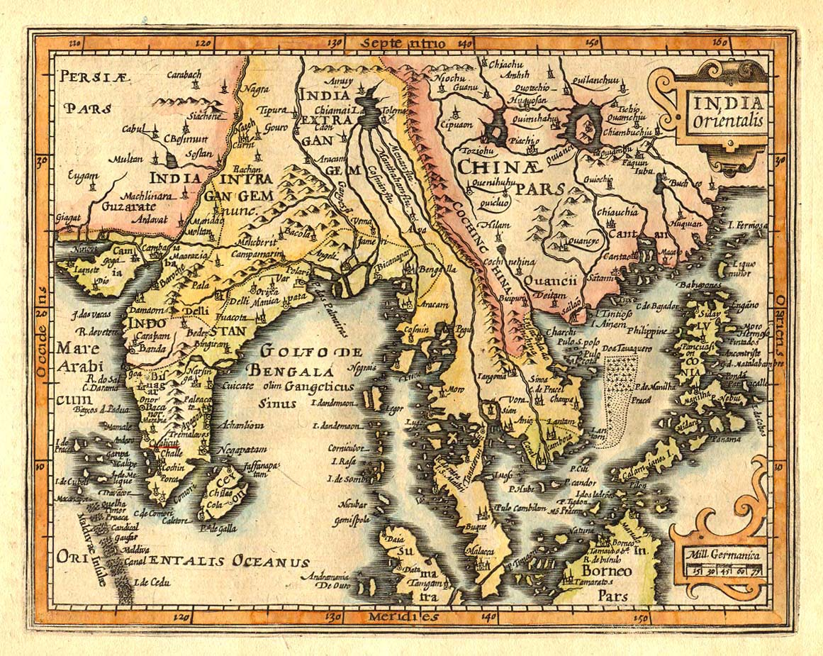 Bản đồ Đông Nam Á gồm cả Ấn Độ và Trung Quốc năm 1609, do Gerardus Mercator và Jan Hondius vẽ (được tô màu lại sau khi xuất bản). Trong bản đồ nước Đại Việt tức là xứ Giao Chỉ được gọi là Cochinchina để phân biệt với địa danh Cochin ở tây nam Ấn Độ, quần đảo Hoàng Sa gọi là Pracel và được ghi thuộc Champa tại vị trí trong đất liền giữa Cinoa (Thuận Hóa) và Champa là C. de Pracel.